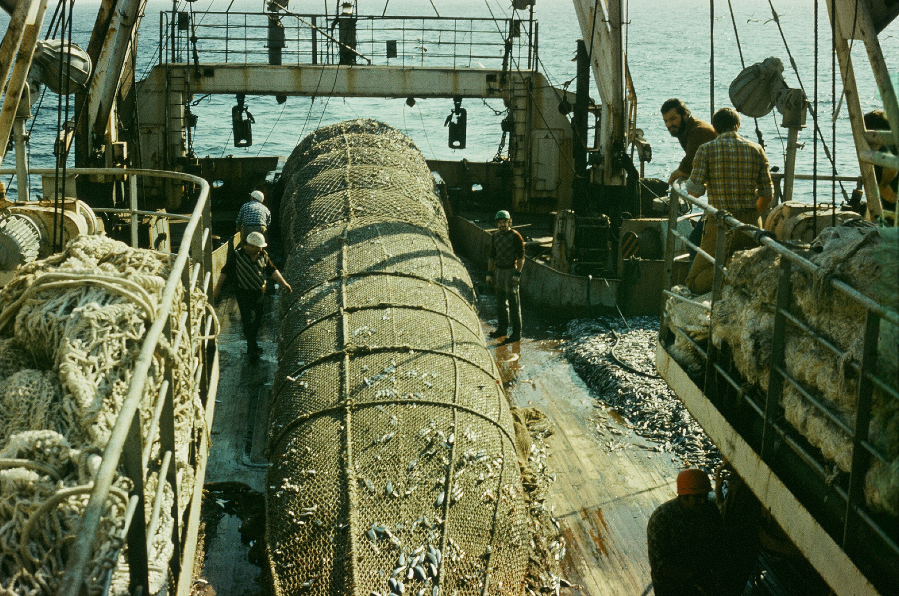 W morzu M/T Kantar ,połowy ostroboka......